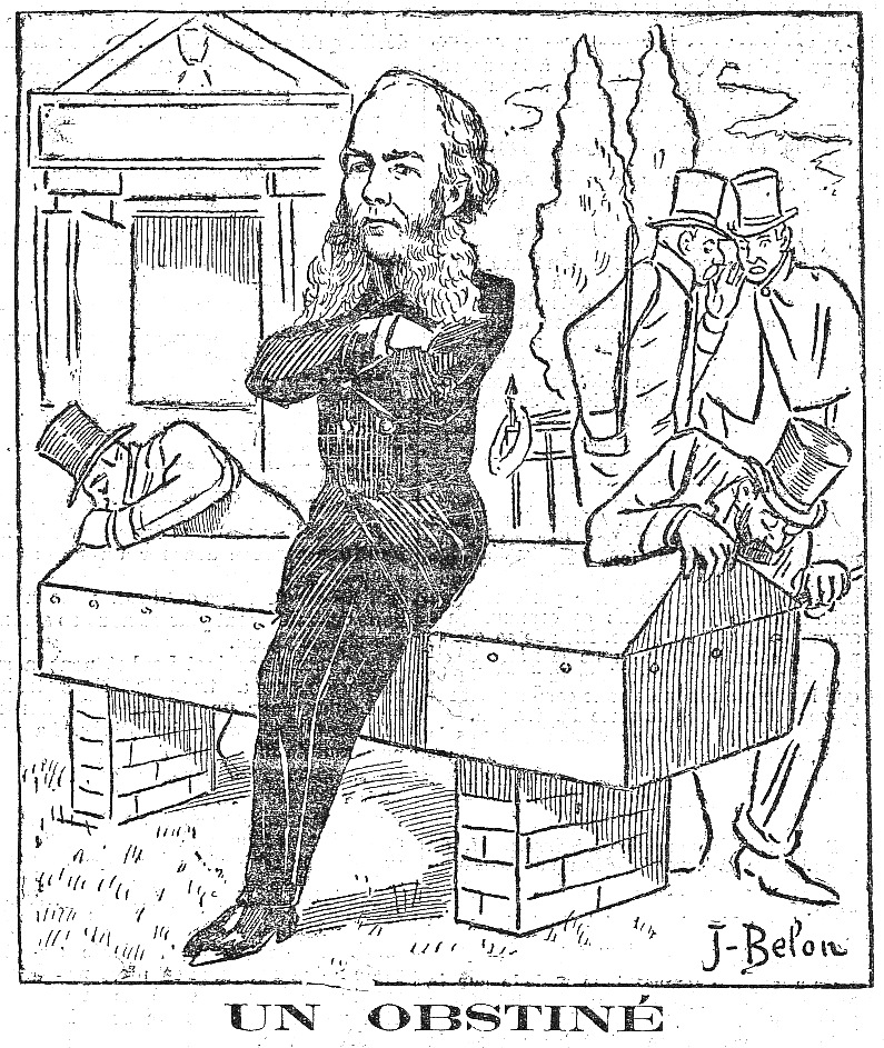 "Un obstiné" (Ricard, ministre de la Justice, sur la tombe de Jacques de Reinach). Caricature sur la chute du gouvernement Loubet suite au vote de la Chambre en faveur d'une mesure refusée par les ministres, l'autopsie du baron de Reinach.